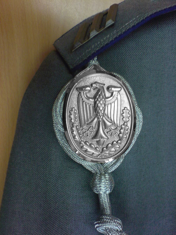 Silberne Plakette der Schützenschnur